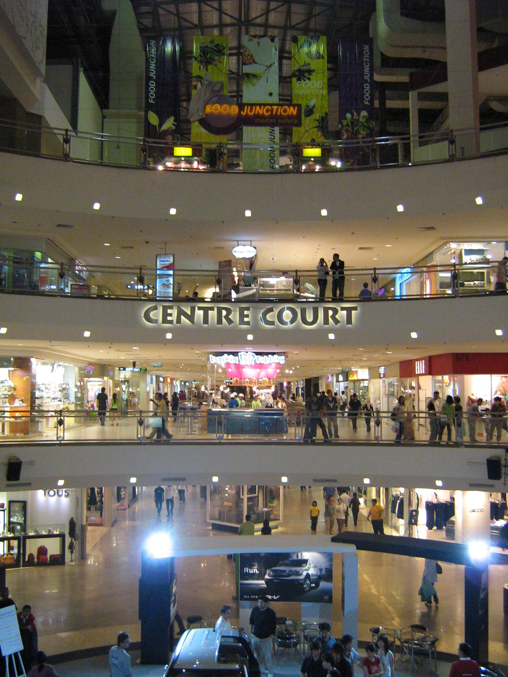 mid valley mega mall, malaysia